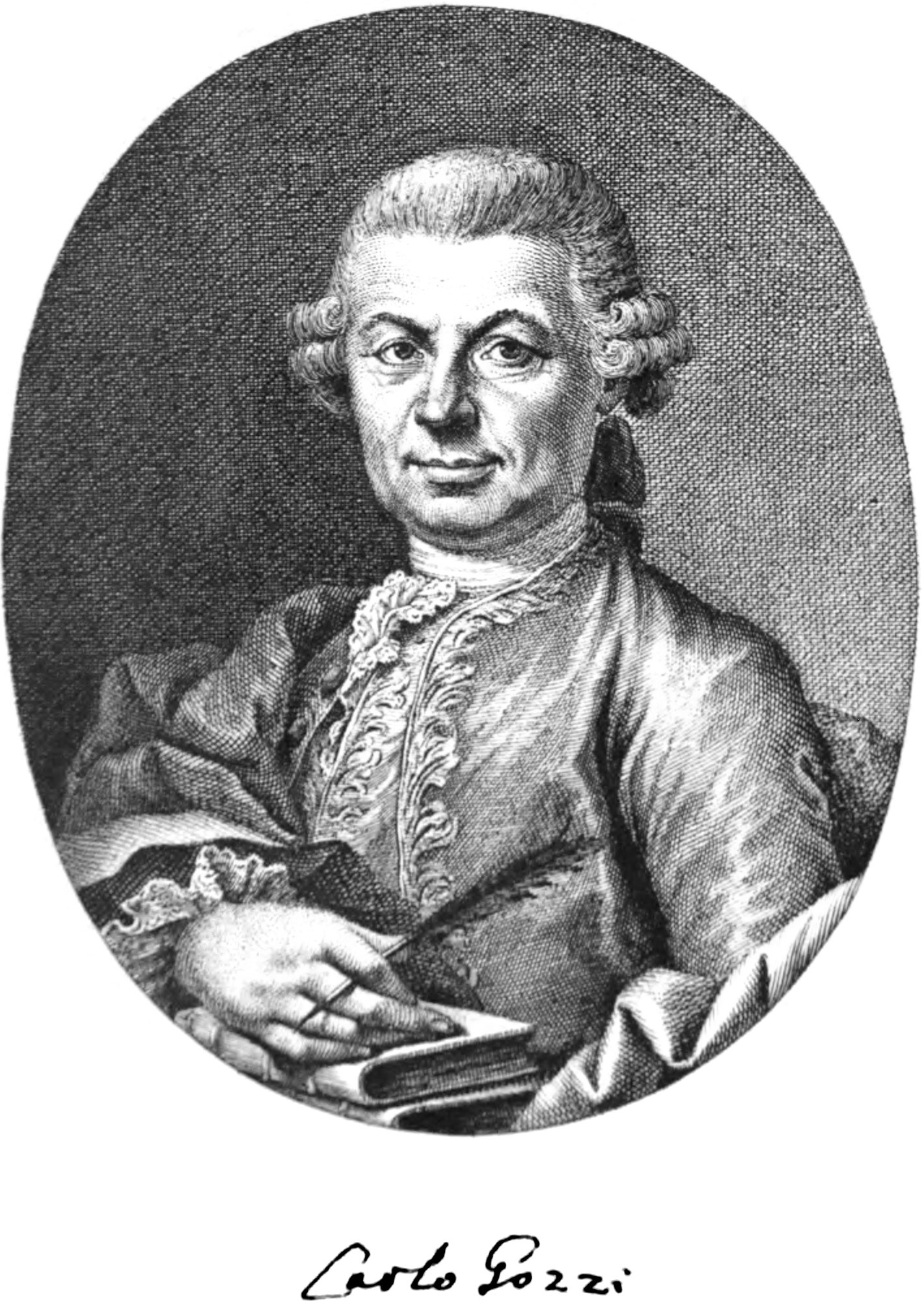 Illustrazioni da Le fiabe di Carlo Gozzi, volume I, Bologna, Nicola Zanichelli, 1884